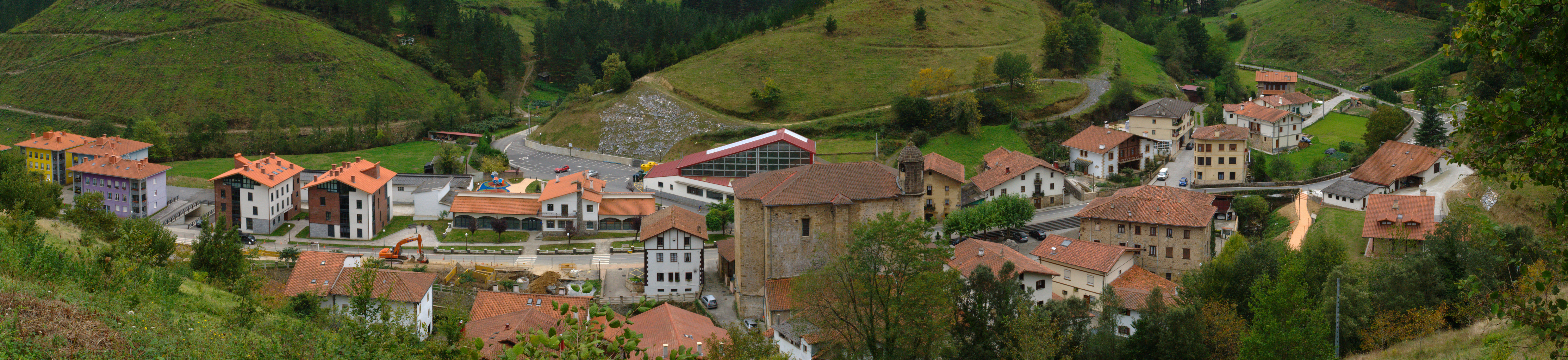 Bolibarreko ikuspegi orokorra